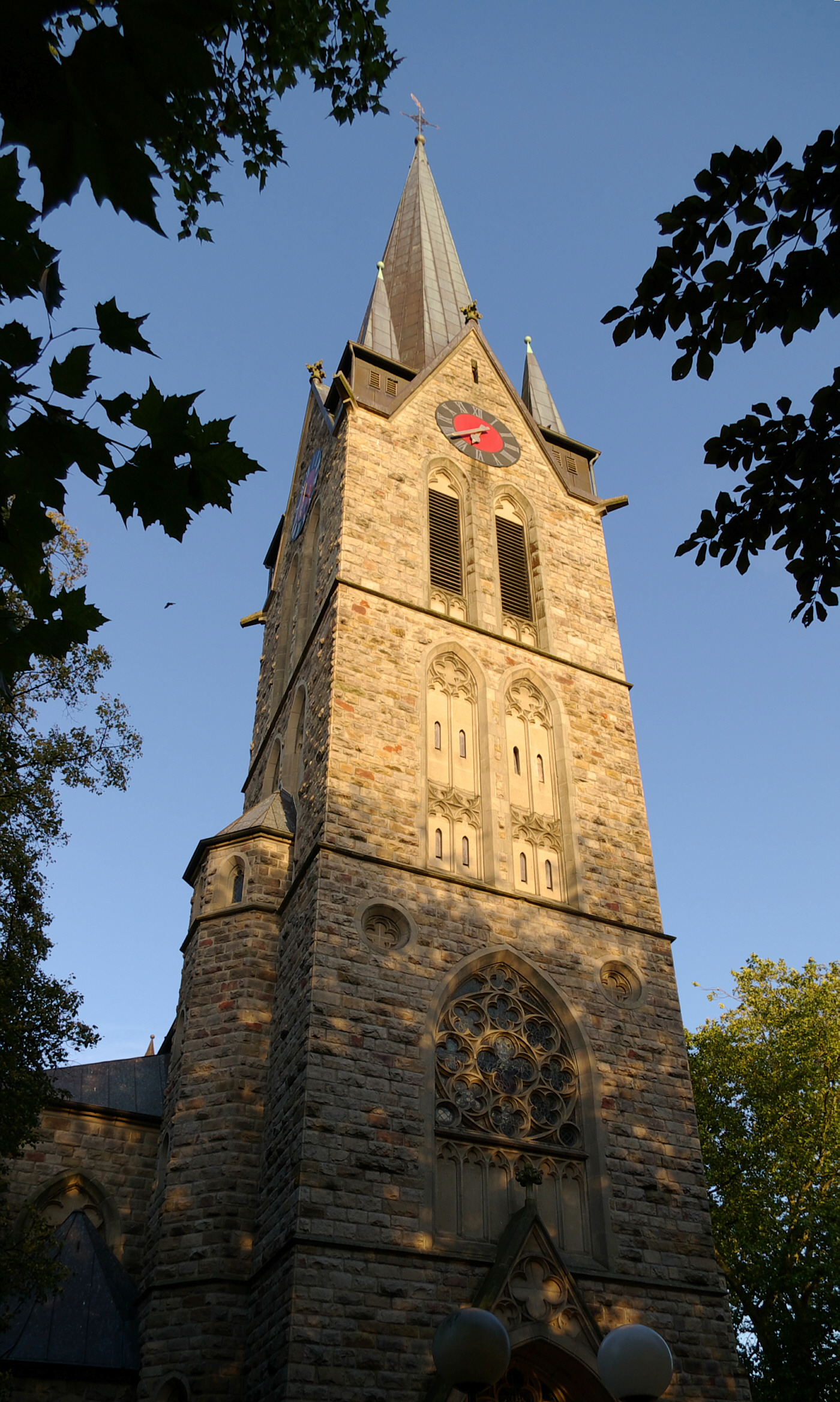 Holzwickede, Turm der kath. Liebfrauenkirche